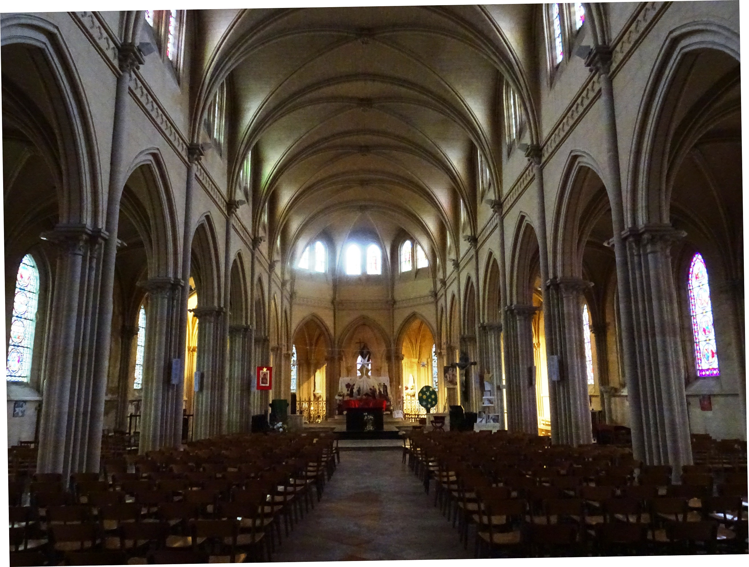 Maromme (Seine-Maritime, France) - Nef de l'église Saint-Martin